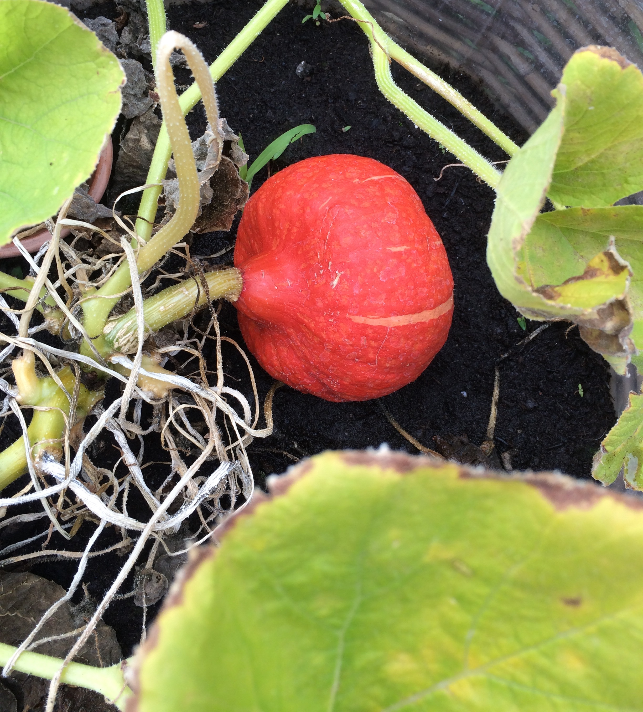 Hokaido